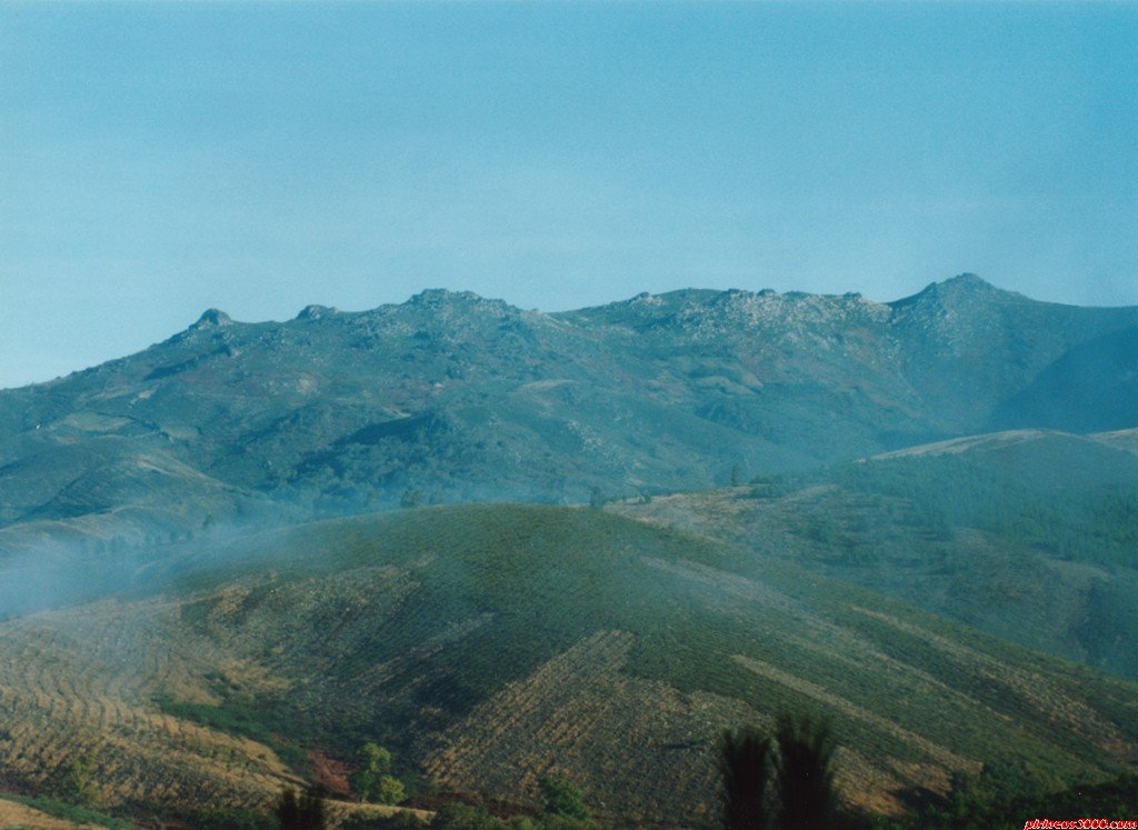 A Serra de San Mamede